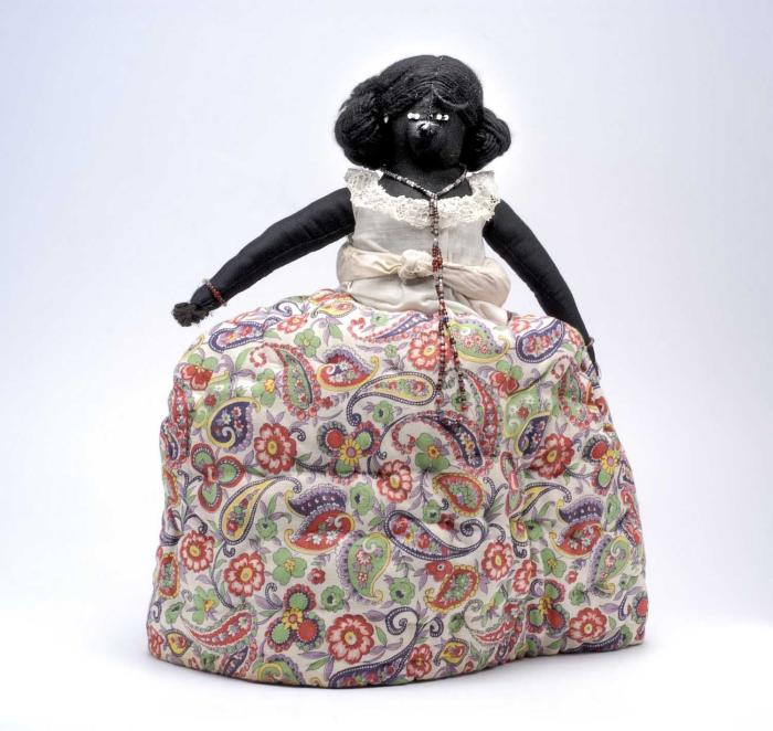 Theemuts. Theemuts in de vorm van een pop in klederdracht van een kotomisi